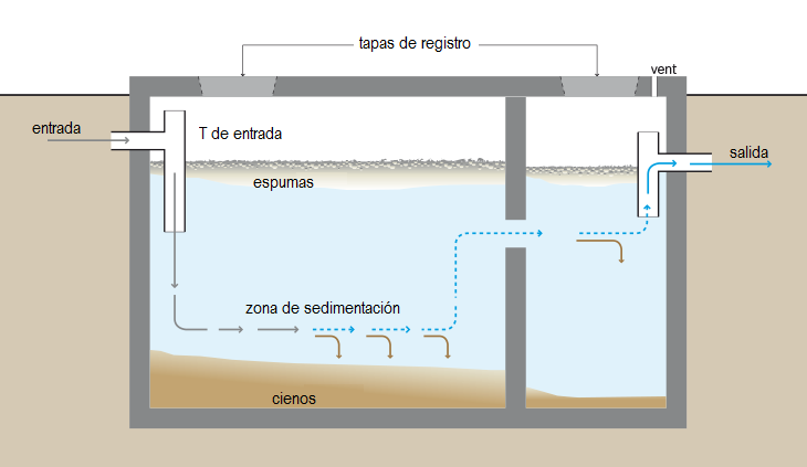 Esquema de funcionamiento de una fosa séptica, çTraducción al español